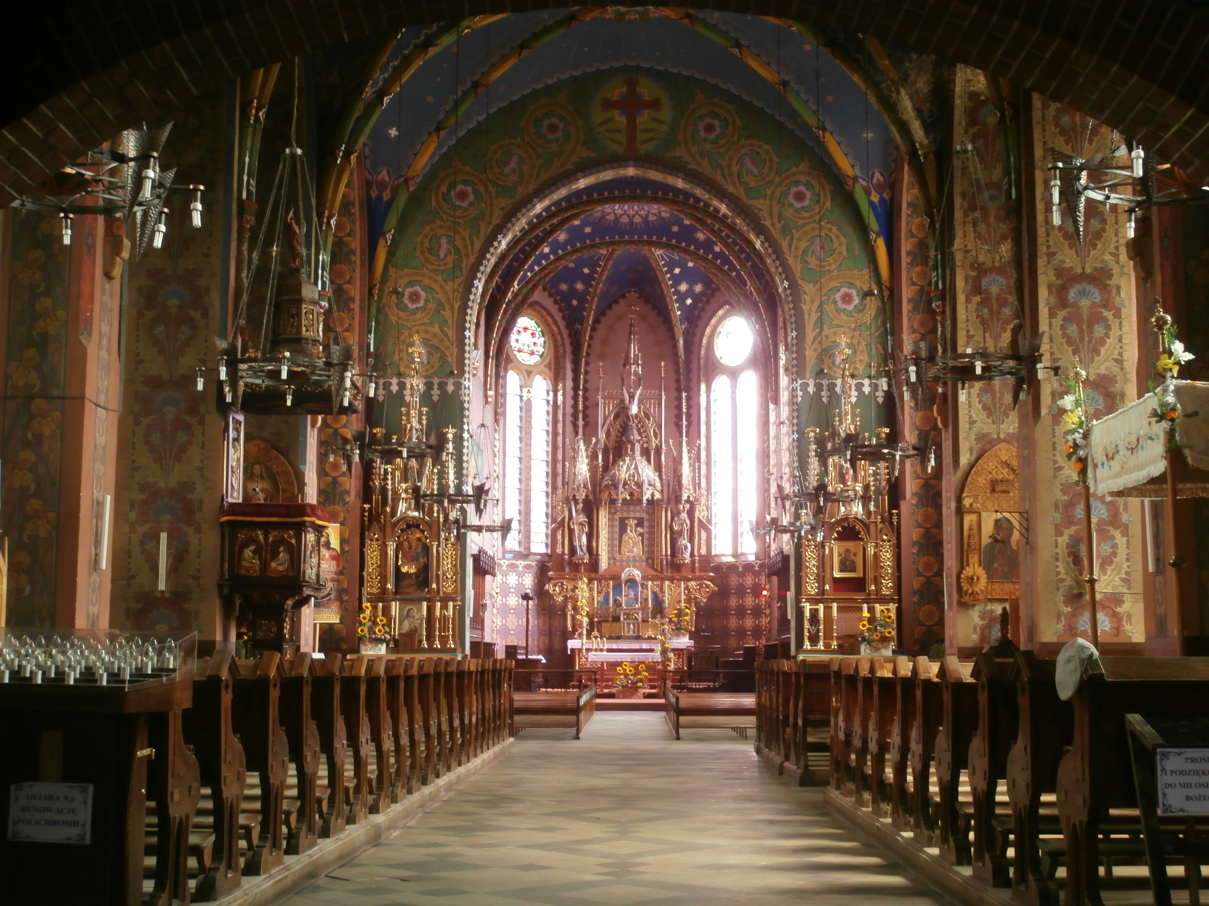 Wnętrze Kościoła pw. św. Marii Magdaleny w Rabce, przy ul. Orkana 8.